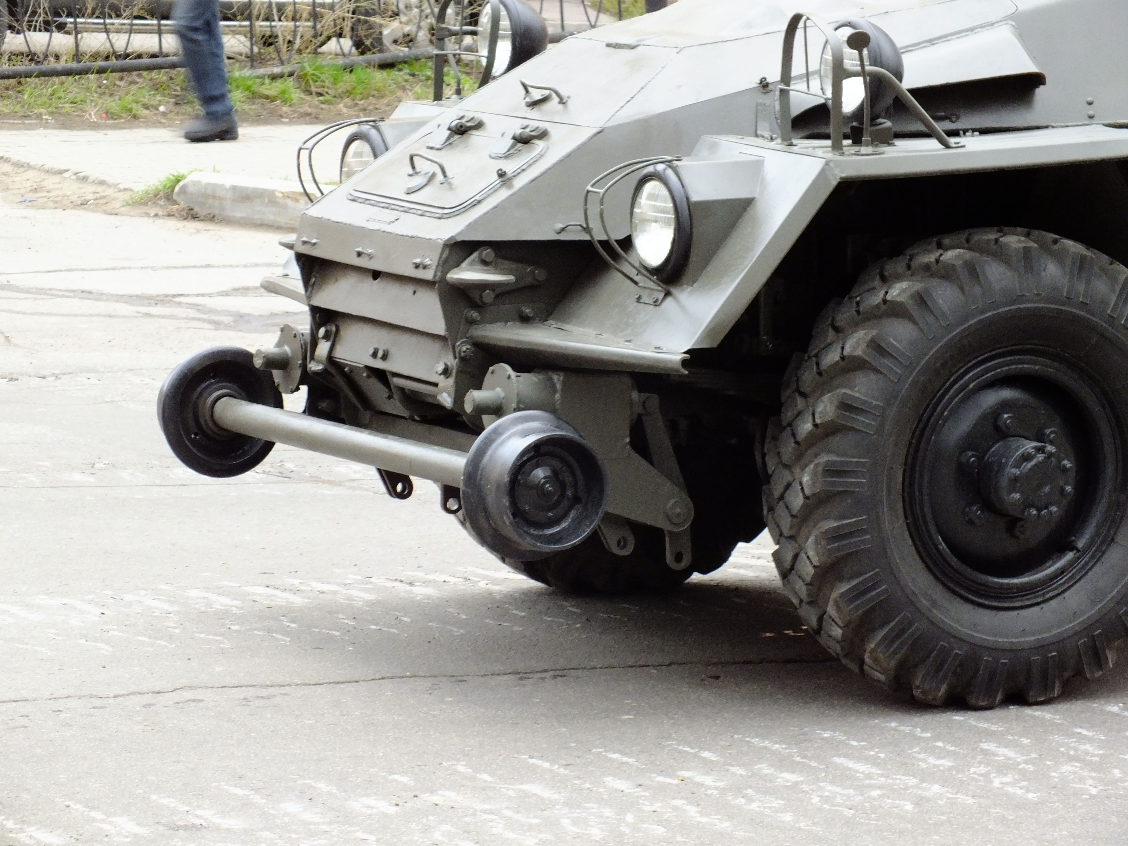 БТР-40 железнодорожный Хабаровск 7 мая 2015